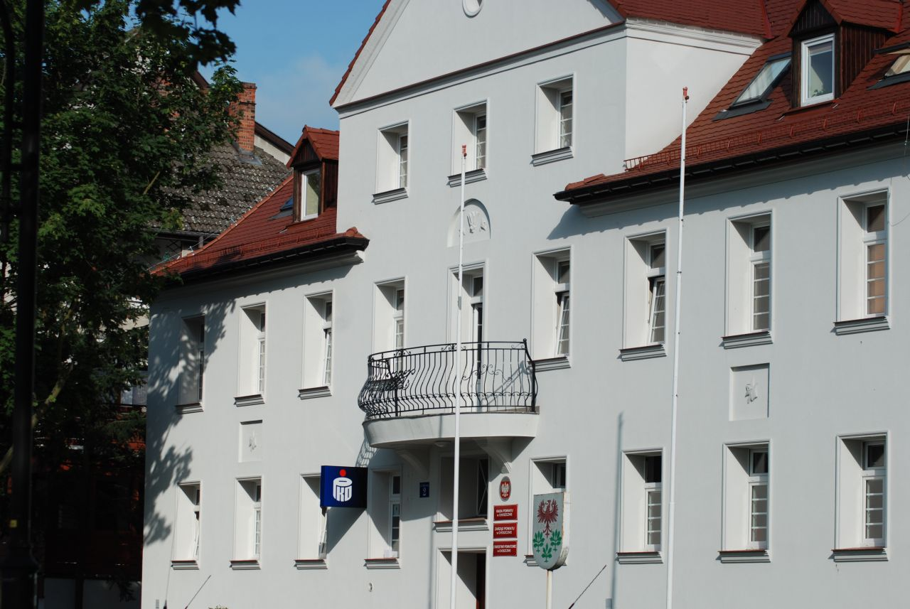 Starostwo Powiatowe w Choszcznie ul. Nadbrzeżna